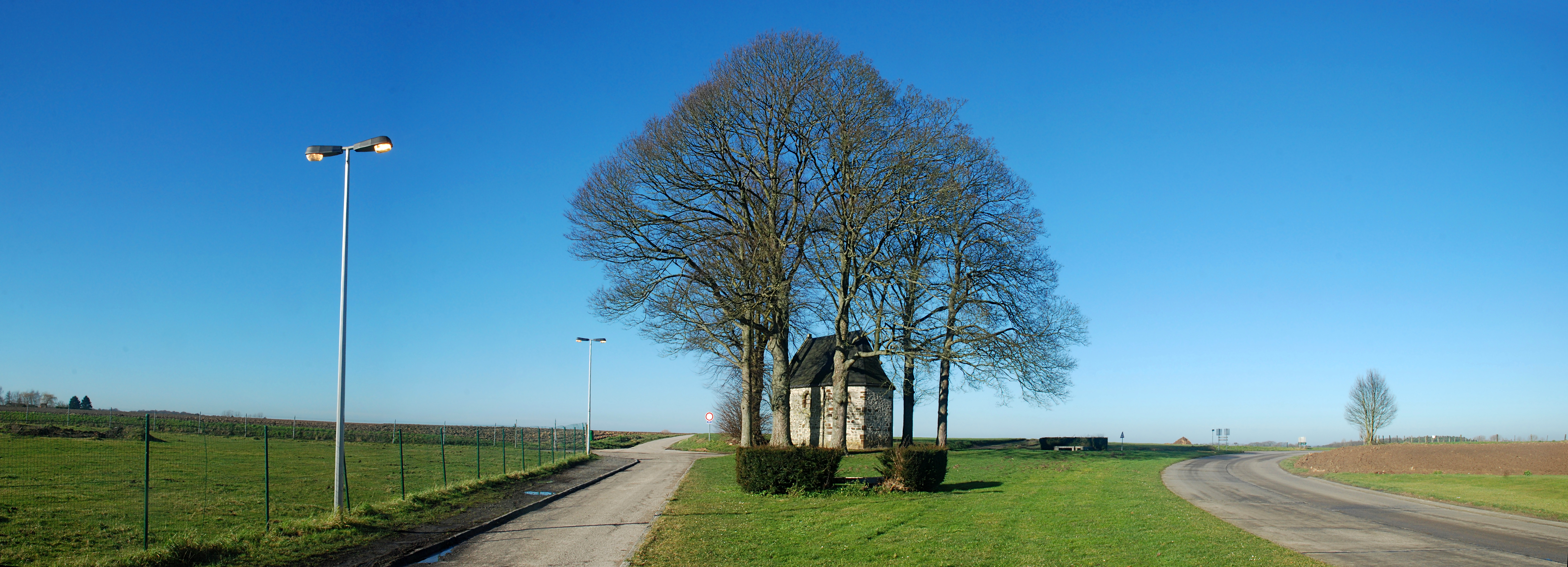 Belgique - Brabant wallon - Chaumont-Gistoux - Longueville - Chapelle du Chêneau (photo panoramique obtenue par assemblage de trois photos à l'aide de MS ICE)